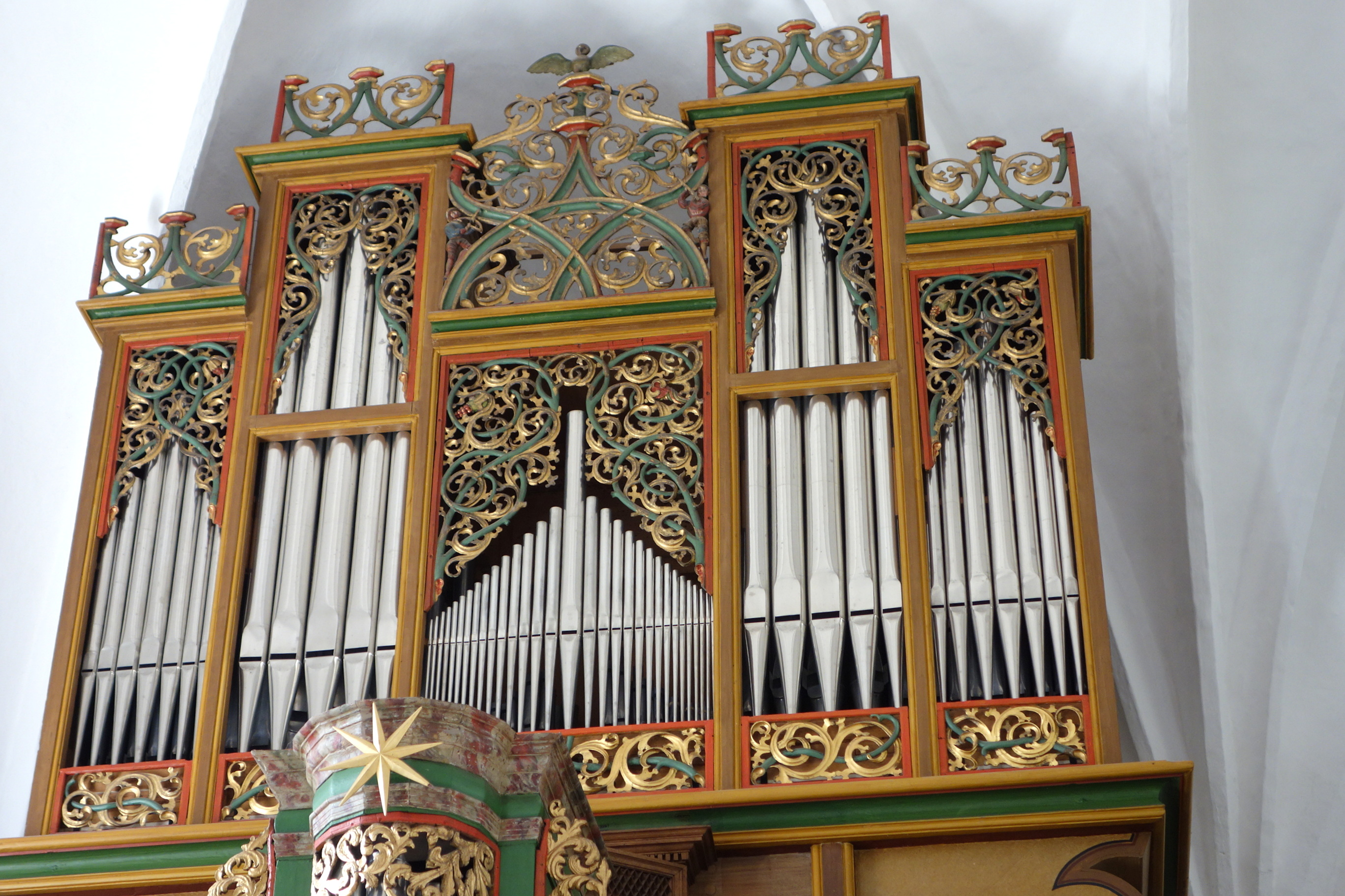 Orgel von St. Christian, Garding, Schleswig-Holstein, Deutschland